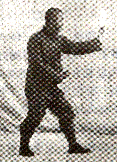 sun lu tang - san ti shi